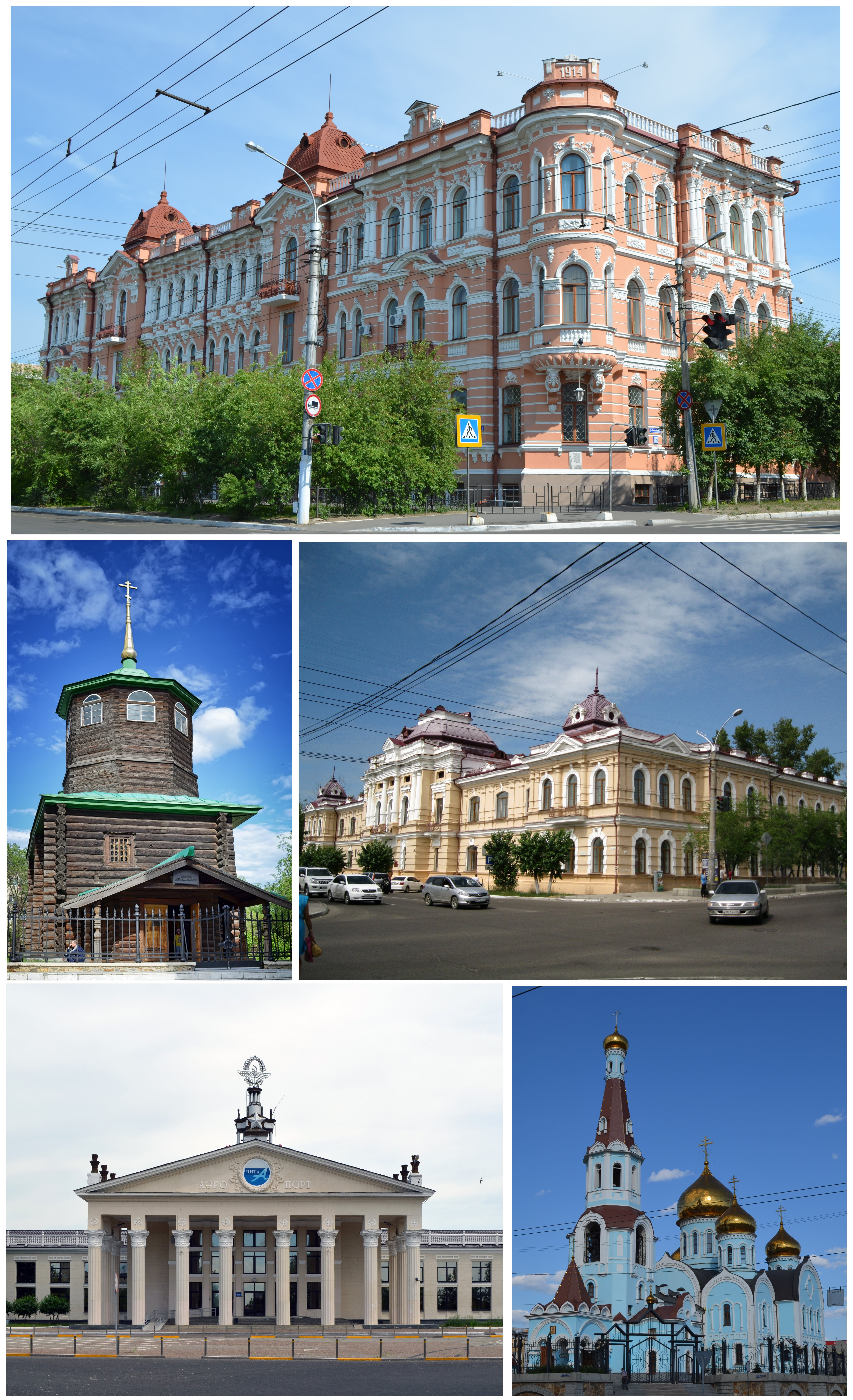 Коллаж из фотографий достопримечательностей Читы.